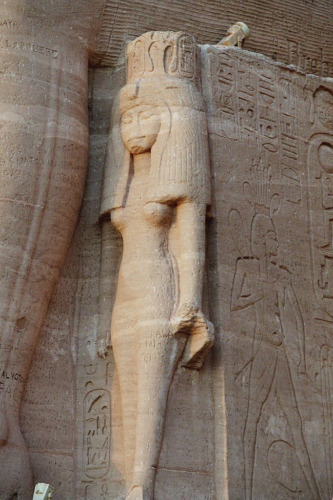 Abu-Simbel temple, Nefertari statue